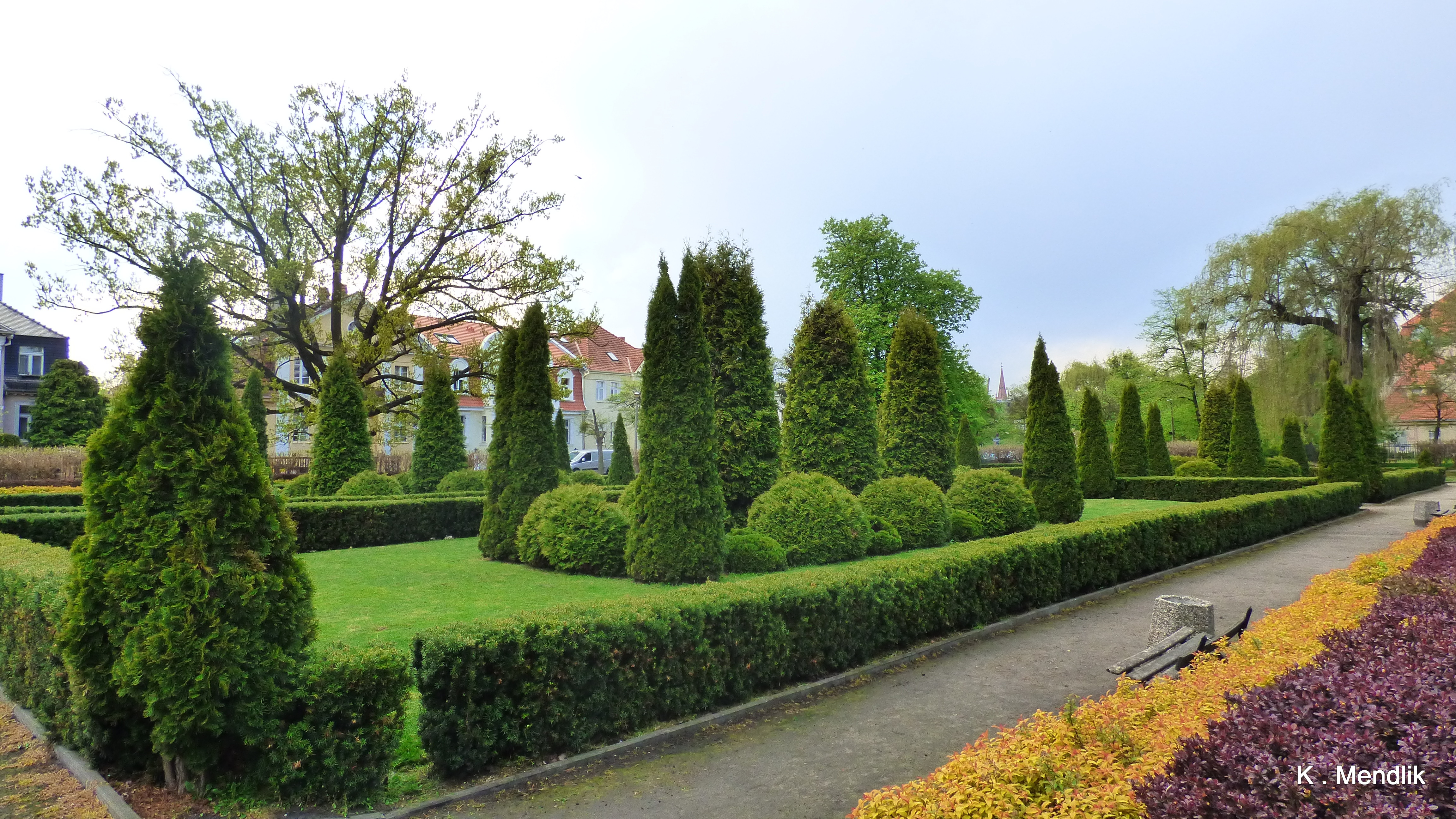 Bydgoszcz, Polska. Skwer Mariana Turwida. Dzielnica Sielanka